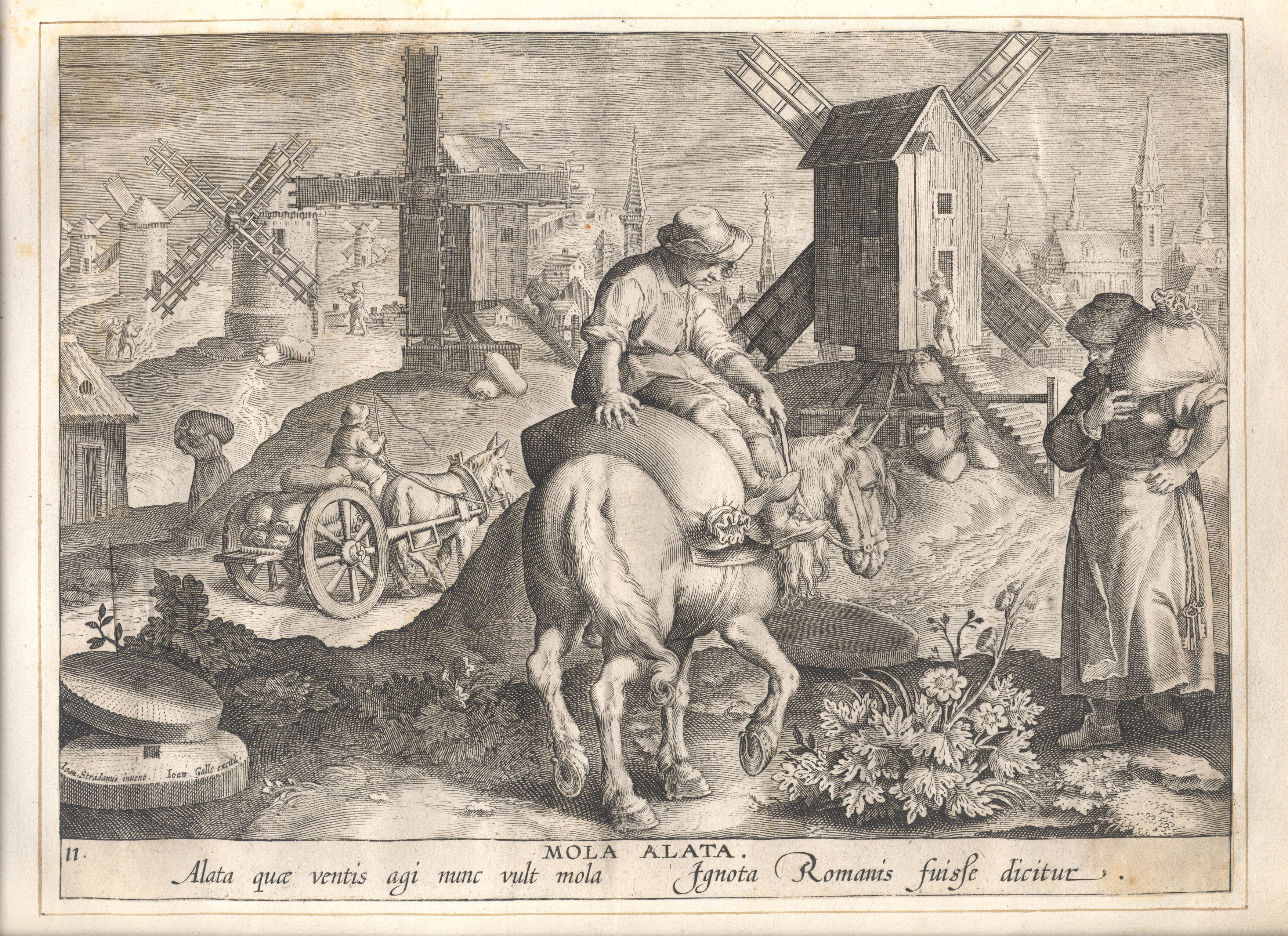 anonymous: The invention of the wind mill Artist anonymousDesigner Stradanus (1523–1605) Alternative names Jan van der Straet, Giovanni della Strada, Johannes della Strada, Giovanni Stradano, Johannes Stradano, Giovanni Stradanus, Johannes Stradanus, Jan van Straeten, Jan van StratenDescriptionFlemish painter and draughtsmanDate of birth/death 1523 2 November 1605 Location of birth/death Bruges FlorenceWork location Antwerp (1545), Florence (circa 1550-1605), Rome (circa 1550-1553), Montemurlo (1590)Authority control : Q143595 VIAF: 29699451 ISNI: 0000 0000 8108 906X ULAN: 500011304 LCCN: n84804240 NLA: 35875335 WorldCat creator QS:P170,Q143595 Title De uitvinding van de windmolenPublisher Jan Galle Object type engraving Description Gravure , anoniem, Museum Plantin-MoretusMedium gravureCollection Museum Plantin-Moretus Native nameMuseum Plantin-MoretusLocationAntwerpCoordinates51° 13′ 05.86″ N, 4° 23′ 53.39″ E Established1877 Web page control : Q595802 VIAF: 130668175 ISNI: 0000 0001 2285 9666 LCCN: n50051109 UNESCO: 1185 GND: 1007736-4 WorldCat institution QS:P195,Q595802Accession number PK OPB 0186 012References described at URL: Source/Photographer Museum Plantin-Moretus Native nameMuseum Plantin-MoretusLocationAntwerpCoordinates51° 13′ 05.86″ N, 4° 23′ 53.39″ E Established1877 Web page control : Q595802 VIAF: 130668175 ISNI: 0000 0001 2285 9666 LCCN: n50051109 UNESCO: 1185 GND: 1007736-4 WorldCat institution QS:P195,Q595802Permission(Reusing this file) This file is made available under the Creative Commons CC0 1.0 Universal Public Domain Dedication. The person who associated a work with this deed has dedicated the work to the public domain by waiving all of their rights to the work worldwide under copyright law, including all related and neighboring rights, to the extent allowed by law. You can copy, modify, distribute and perform the work, even for commercial purposes, all without asking permission. Gravure , anoniem, Museum Plantin-Moretus